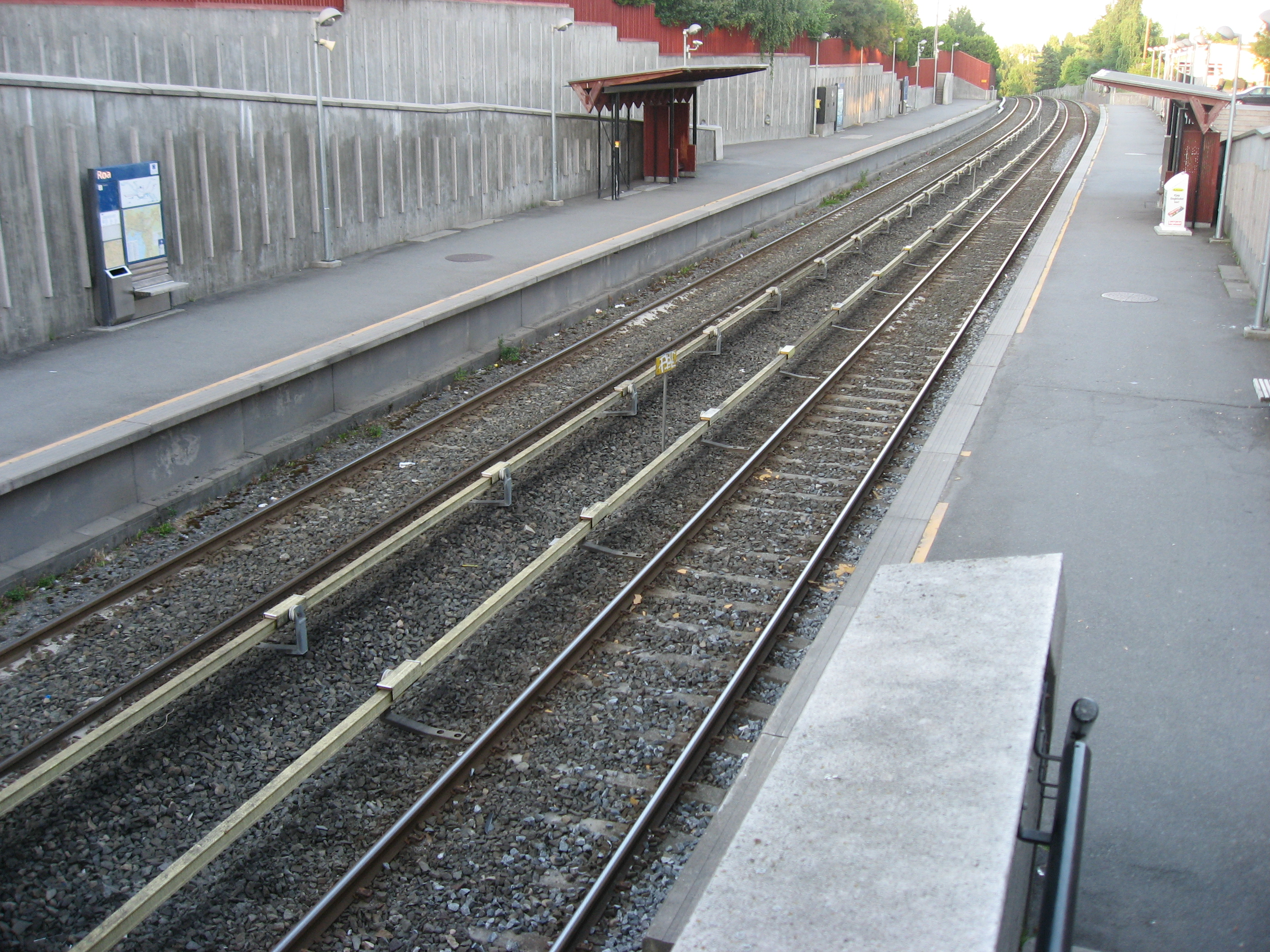 Bilde av Røa t-bane stasjon i Oslo.